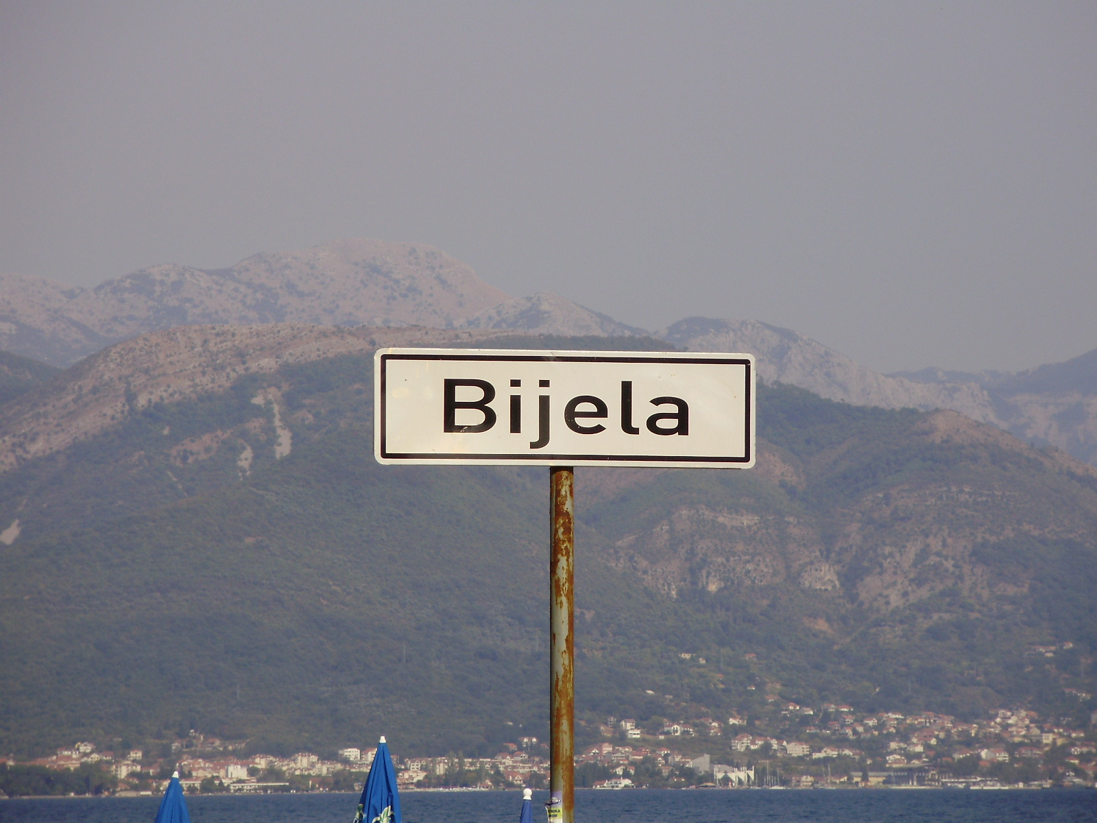 Bijela